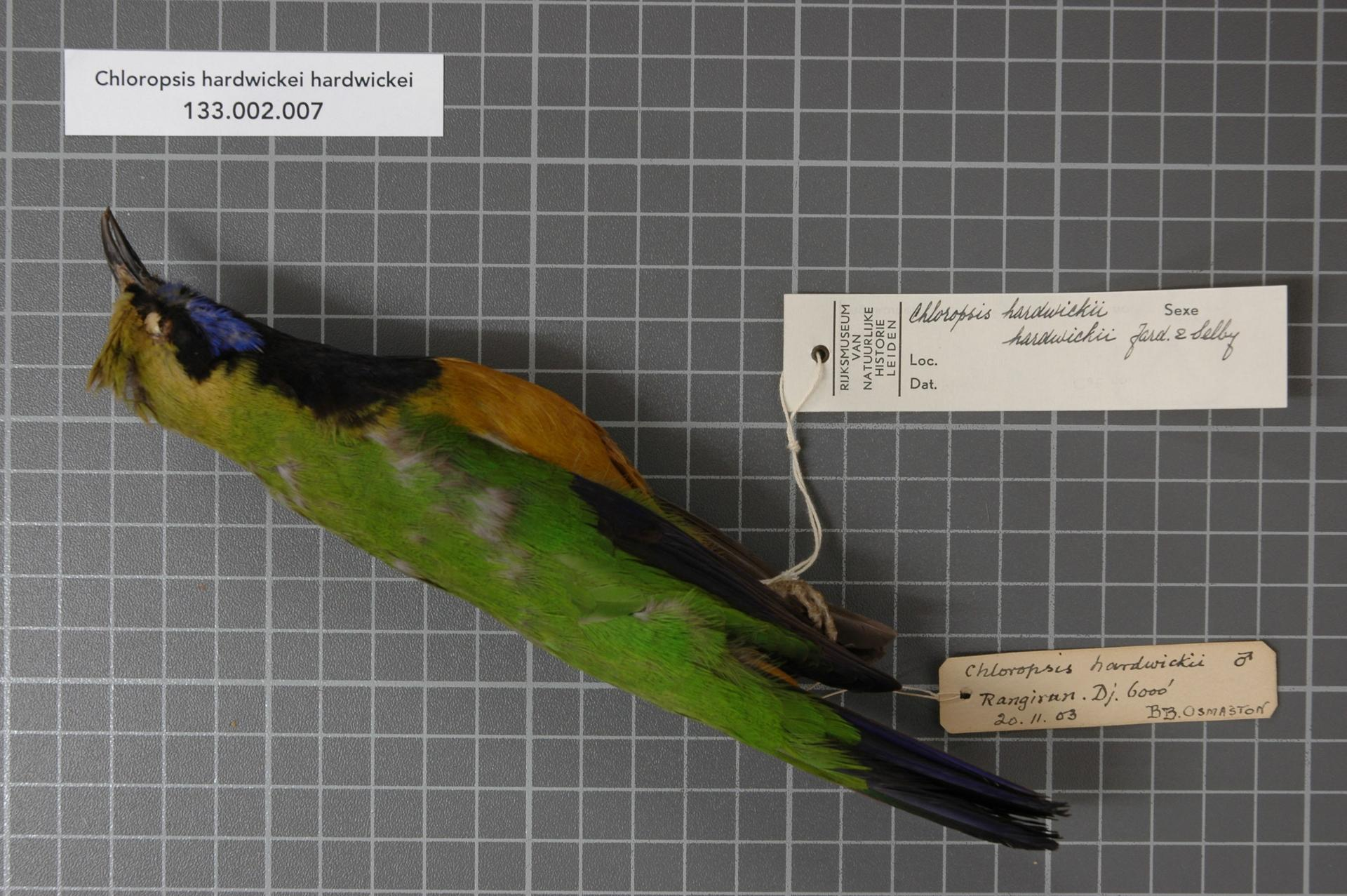 Chloropsis hardwickei hardwickei Jardine and Selby, 1830